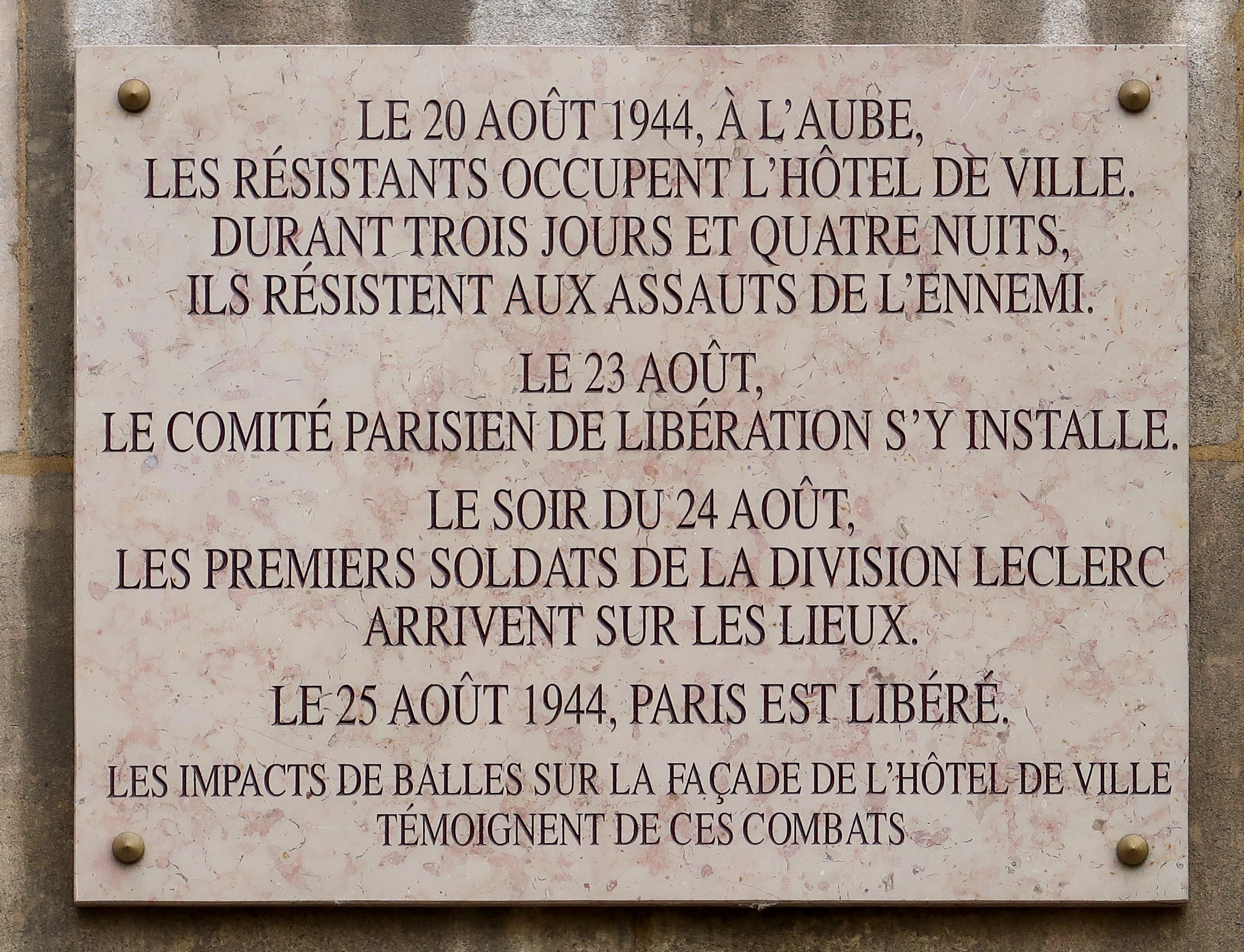 Plaque au sujet de la Libération de Paris située sur la façade rue de Rivoli de l'hôtel de Ville de Paris.